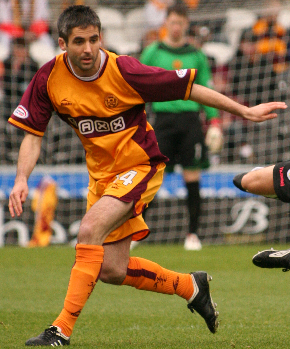 Uhm. .